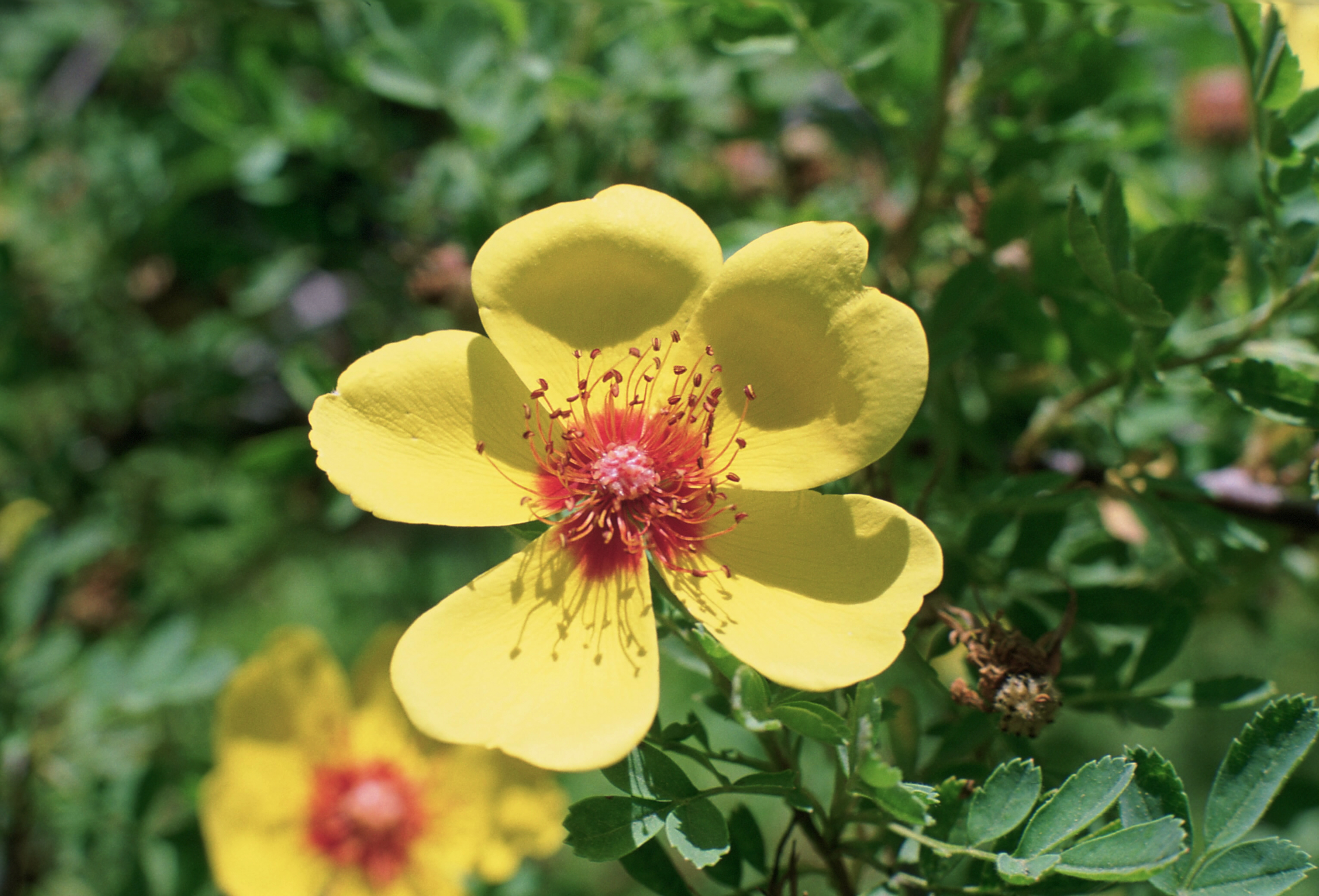 x Hulthemosa hardii, (Hulthemia persica[1] x Rosa clinophylla). Real Jardín Botánico, Madrid